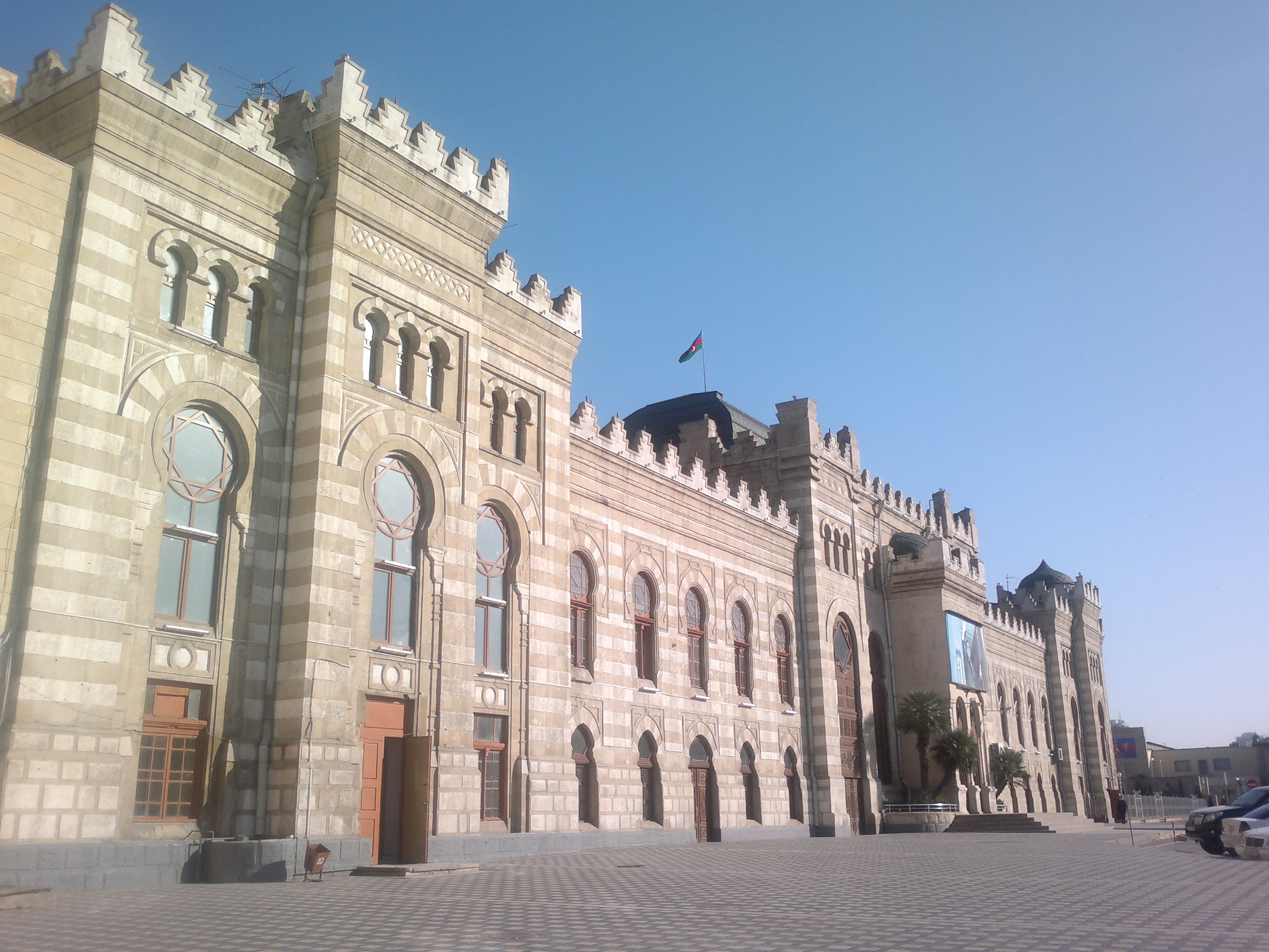 Building of Baku Train Station. Built in 1884.